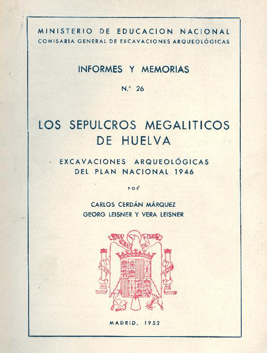 Portada del libro «Los sepulcros megalíticos de Huelva». Madrid, 1952.